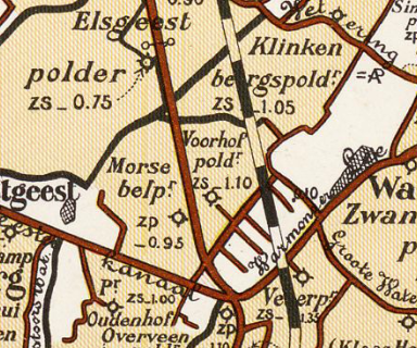 Voorhofpolder